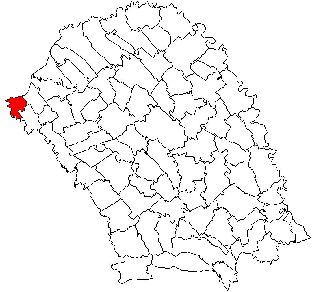 Categorie:Hărţi ale judeţului Botoşani